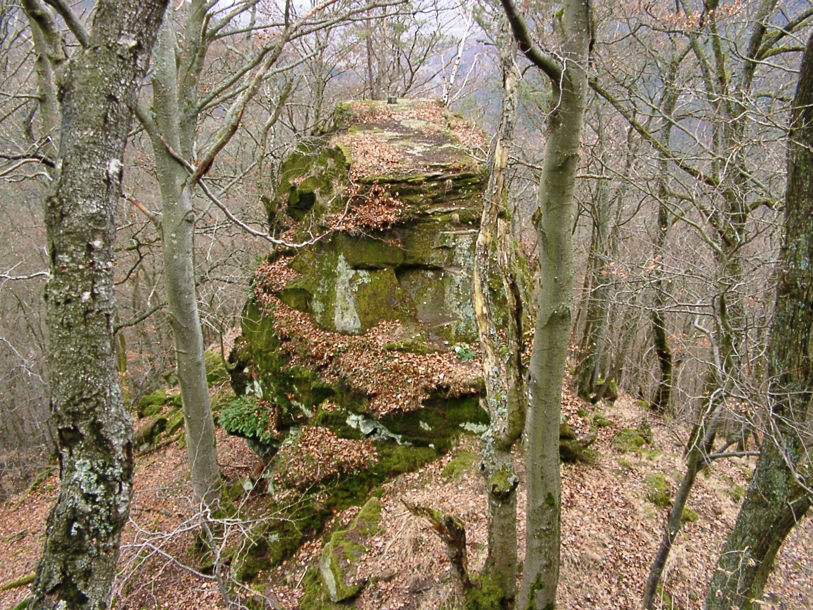 Reste der Burg Franken-Felsen.